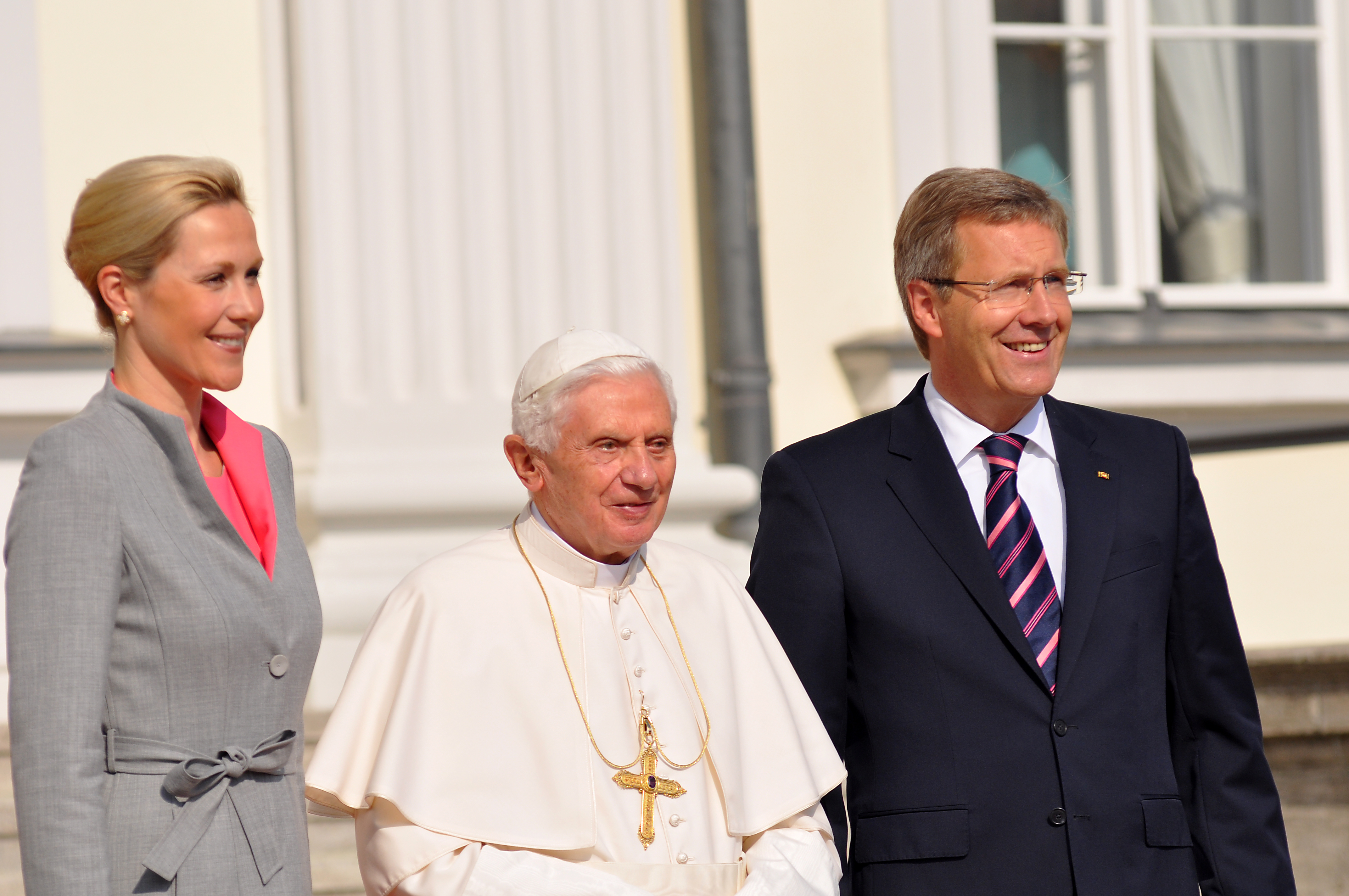 Begruessung von Papst Benedikt XVI. durch Bundespräsident Christian Wulff und Frau Bettina Wulff vor dem Schloss Bellevue in Berlin